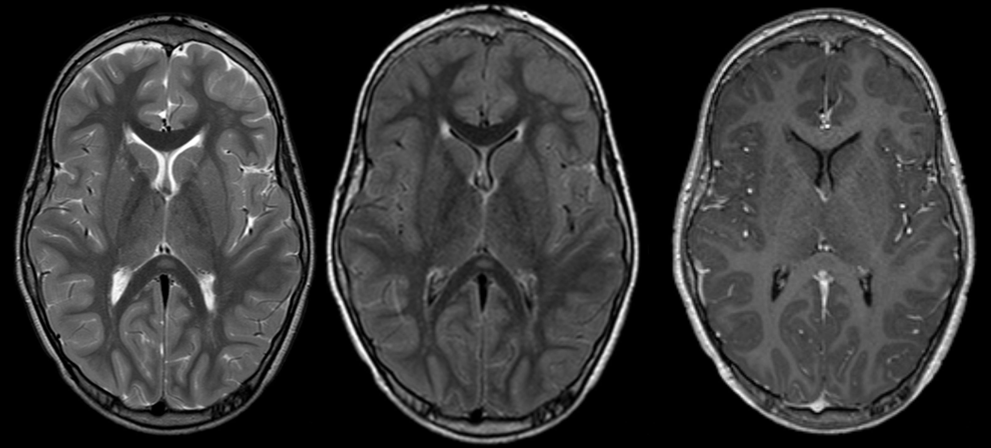 MRT bei "Mild encephalitis / encephalopathy with reversible lesion in the splenium" bei einem 6-jährigen mit Norovirus. T2w, FLAIR, T1 mit Kontrastmittel.